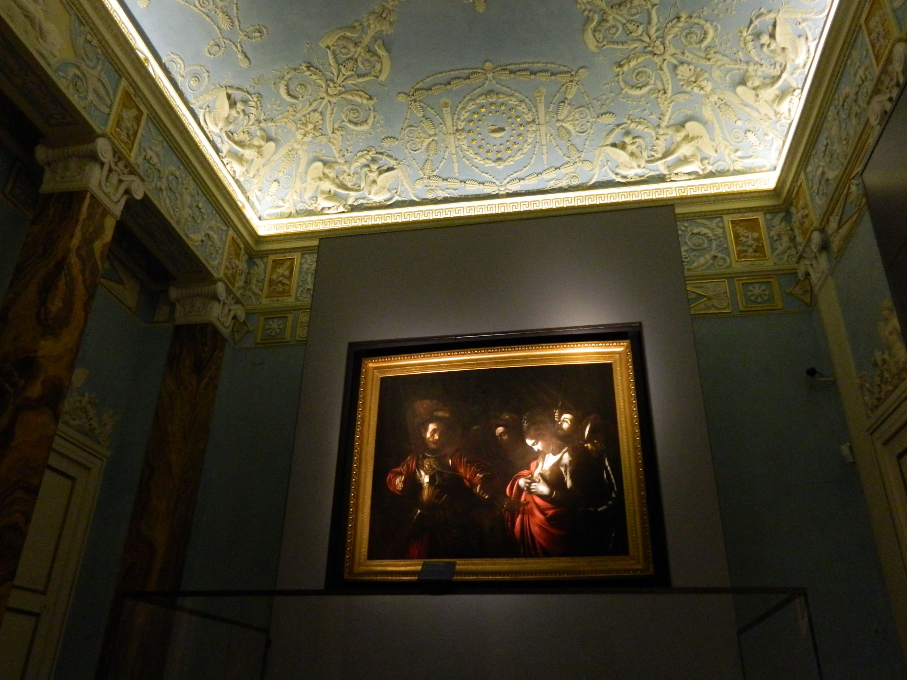 Palazzo Zevallos (Napoli) - Martirio di sant'Orsola di Caravaggio